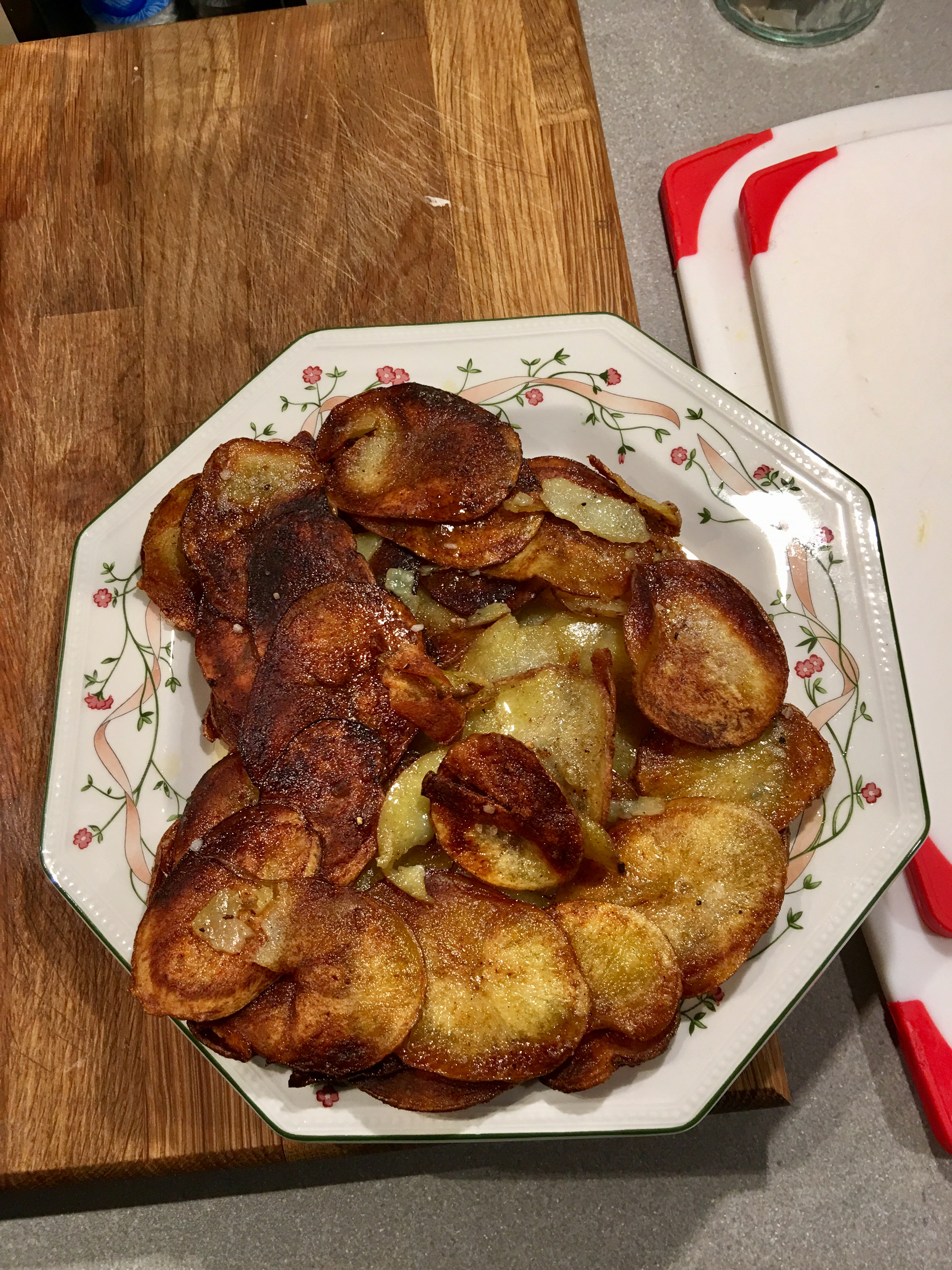 Pommes Anna